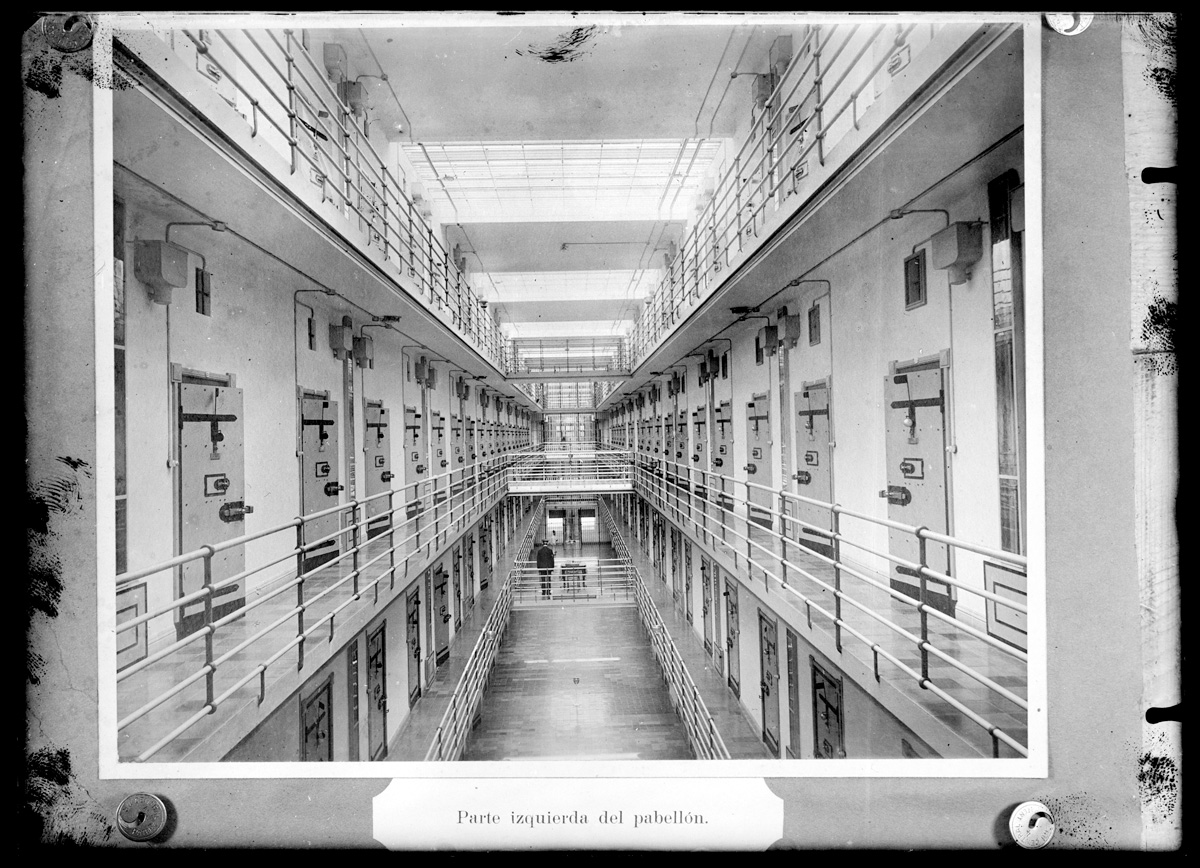 Interior de la Cárcel Penitenciaria de Punta Carretas. Reproducción de copia fotográfica.